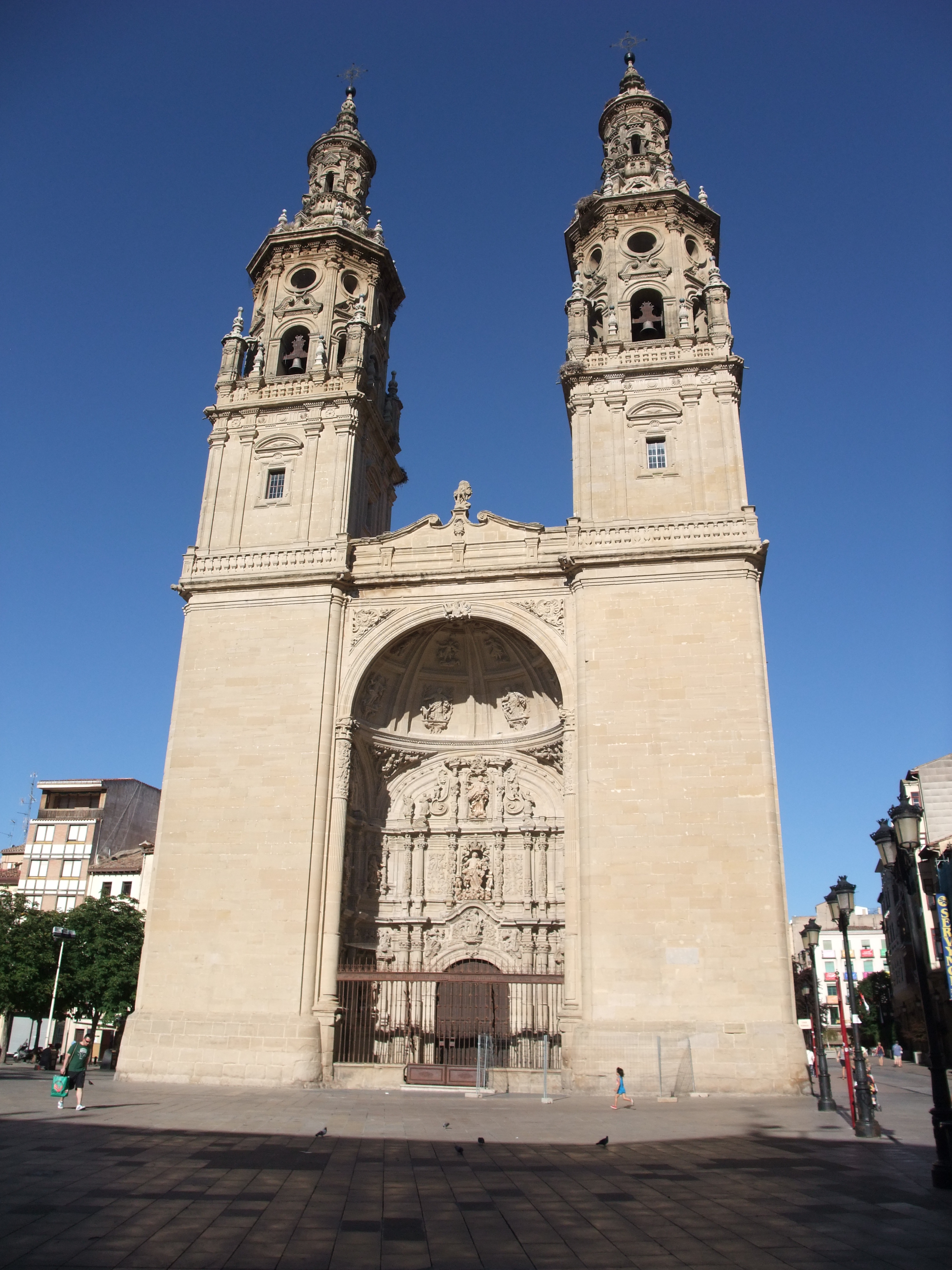 Logroño-Baldomero Espartero-2